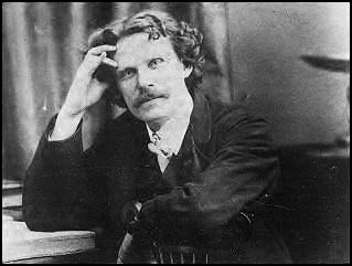 Daniel Home Gescand uit antiquarisch boek (1915)